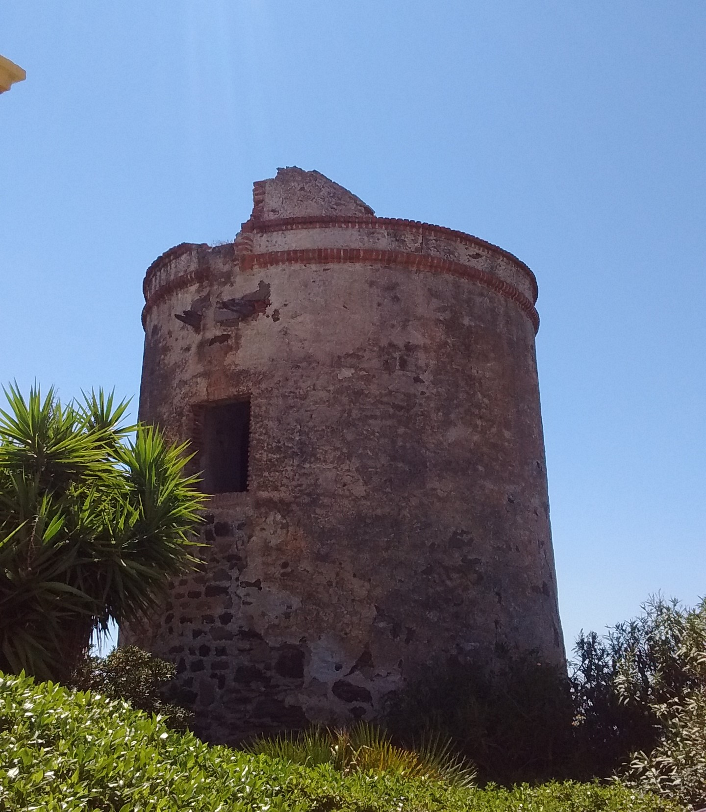 Torre de Macaca